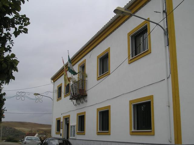 Ayuntamiento de Isla Redonda